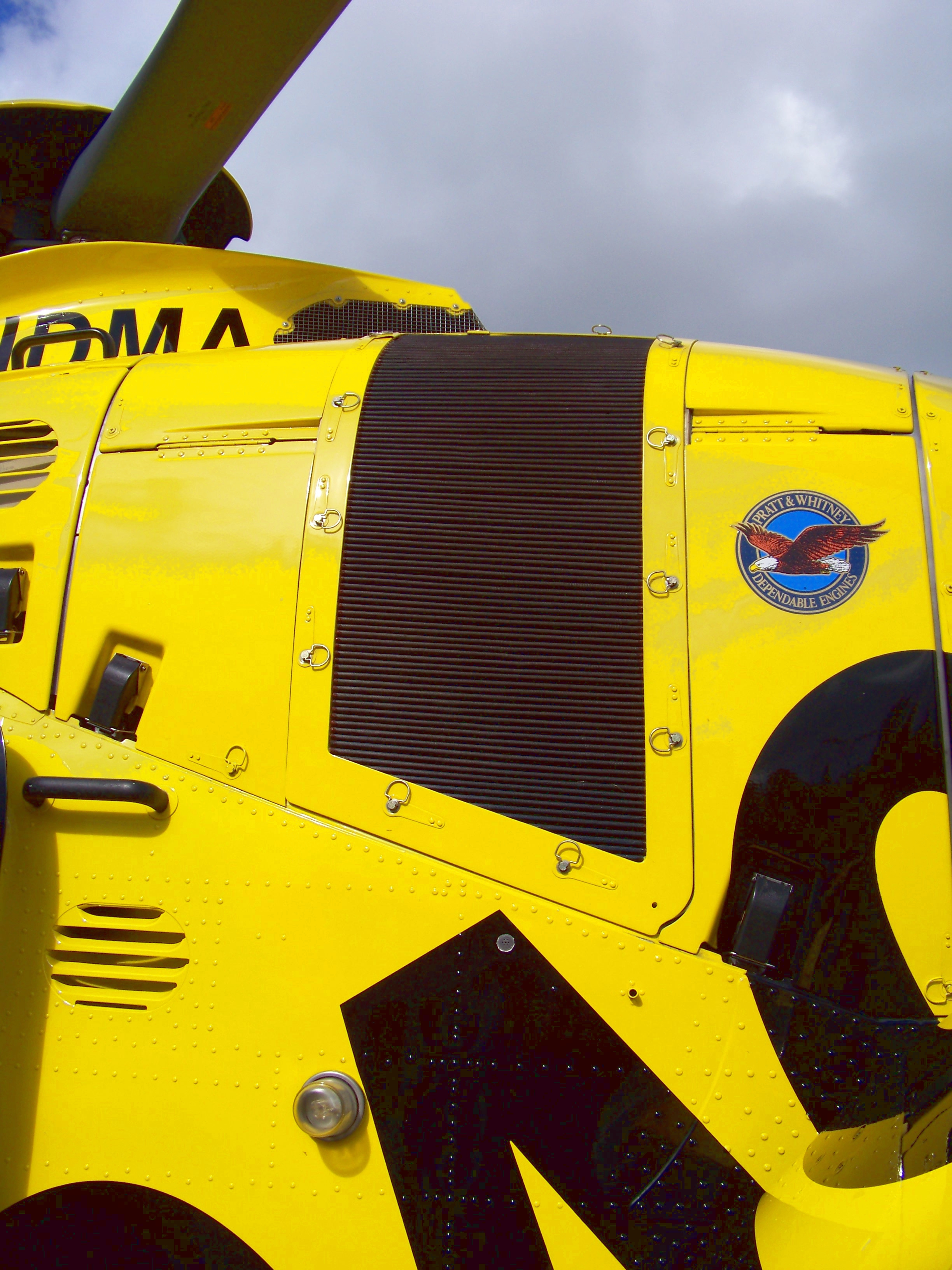 der IBF der D-HDMA